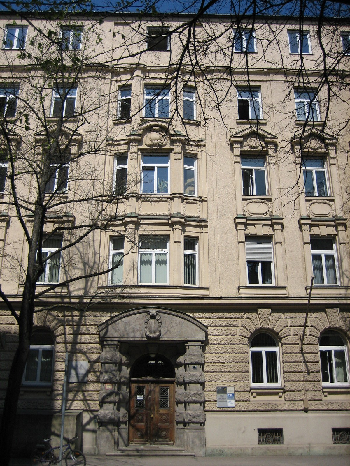 Eingang zum Augsburger Sozialgericht in der Holbeinstraße